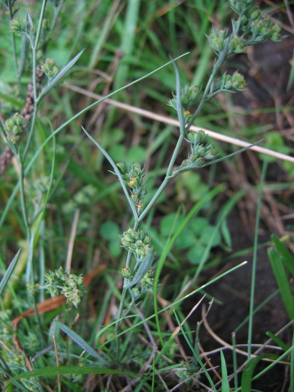 Salz-Hasenohr Bupleurum tenuissimum, Wismarbucht